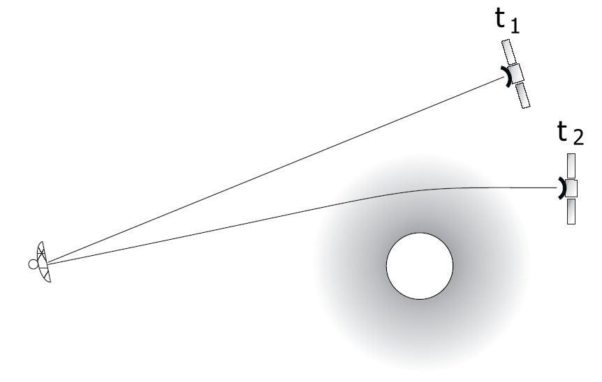 Geometrie zur Radio-Okkultationsmessung